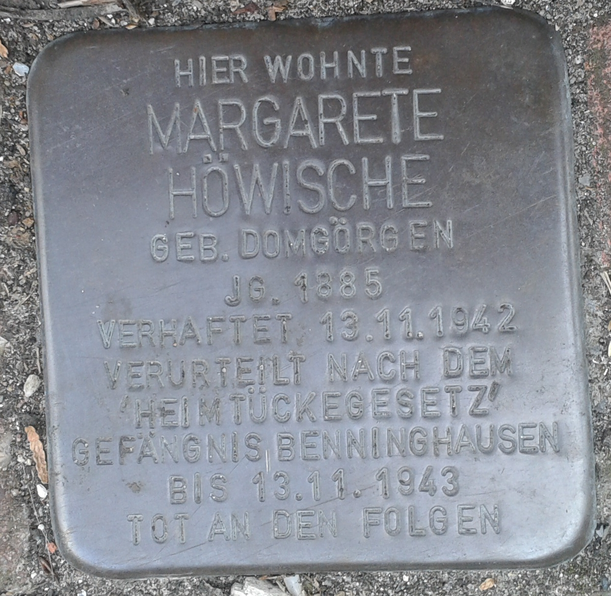 Stolperstein Selm Auf der Sagkuhl 10 Margarete Höwische